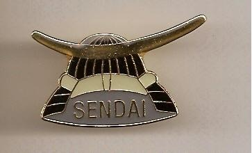 Pin da Copa Sendai disputada no Japão.